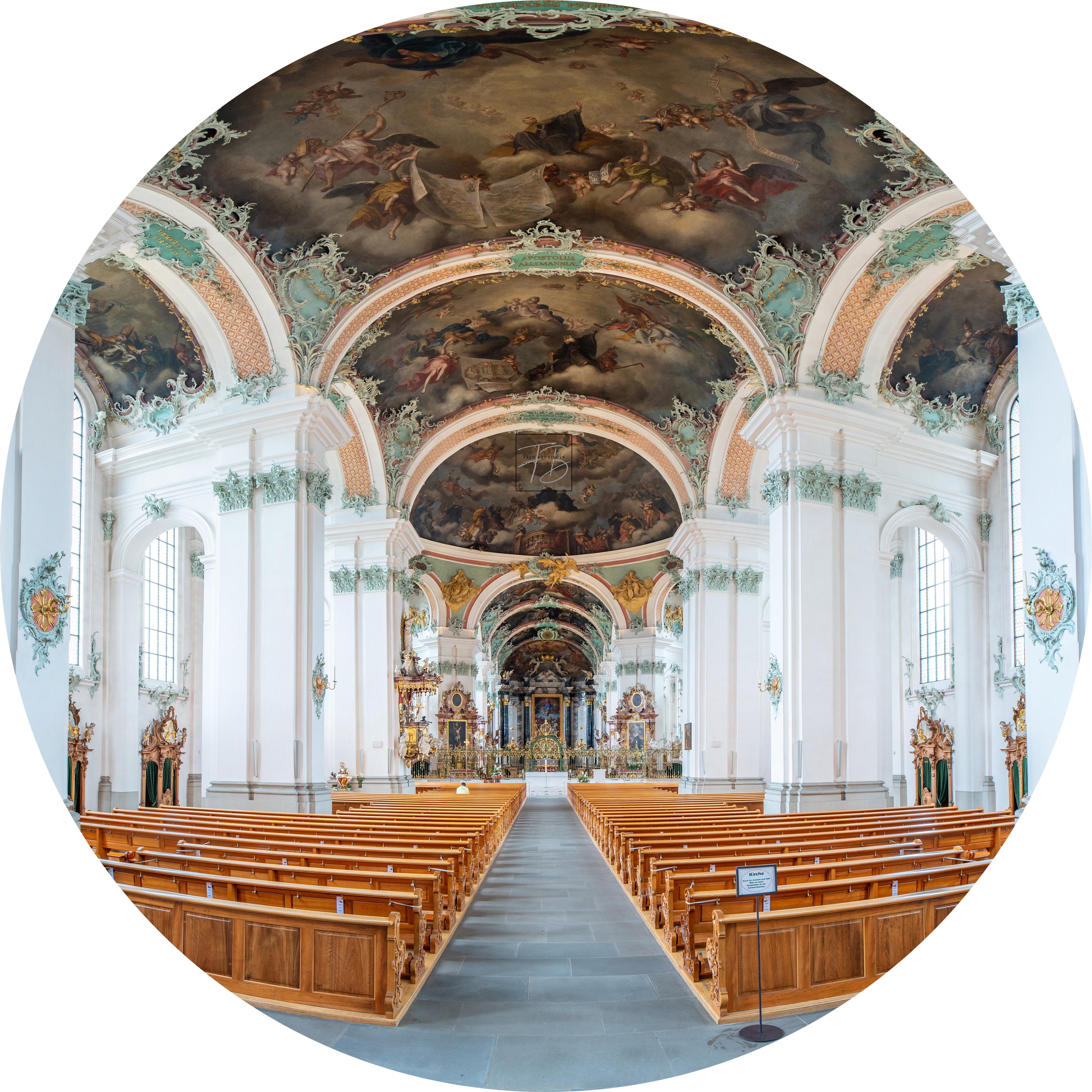 die Stiftskirche St. Gallen, Schweiz.